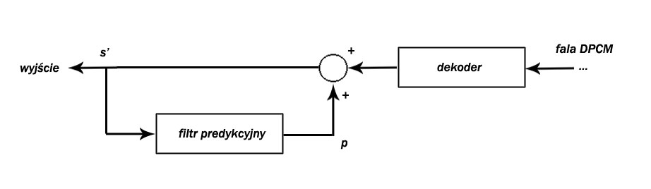 Odbiornik dla modulacji DPCM.